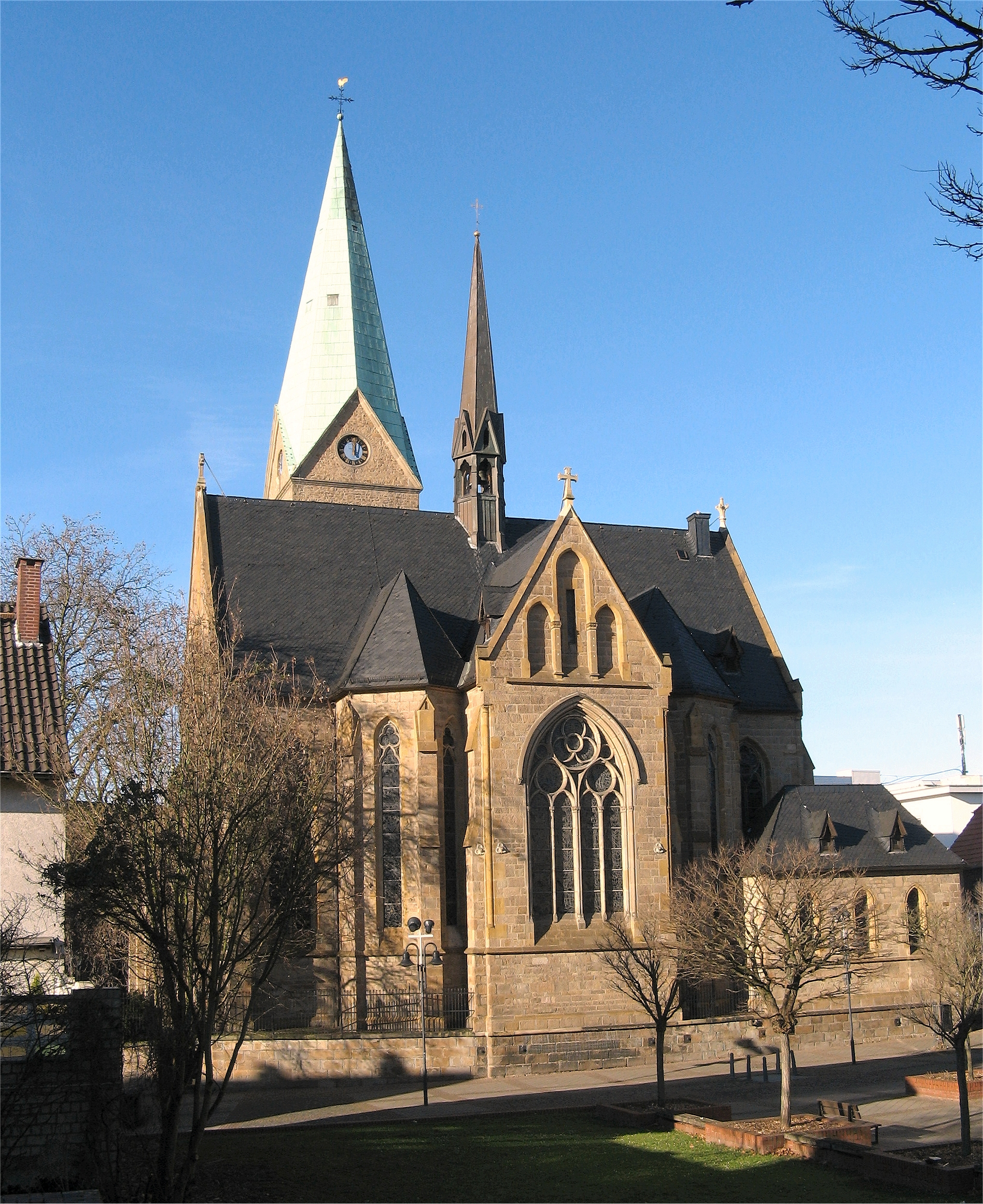 Wattenscheid, Gertrudiskirche